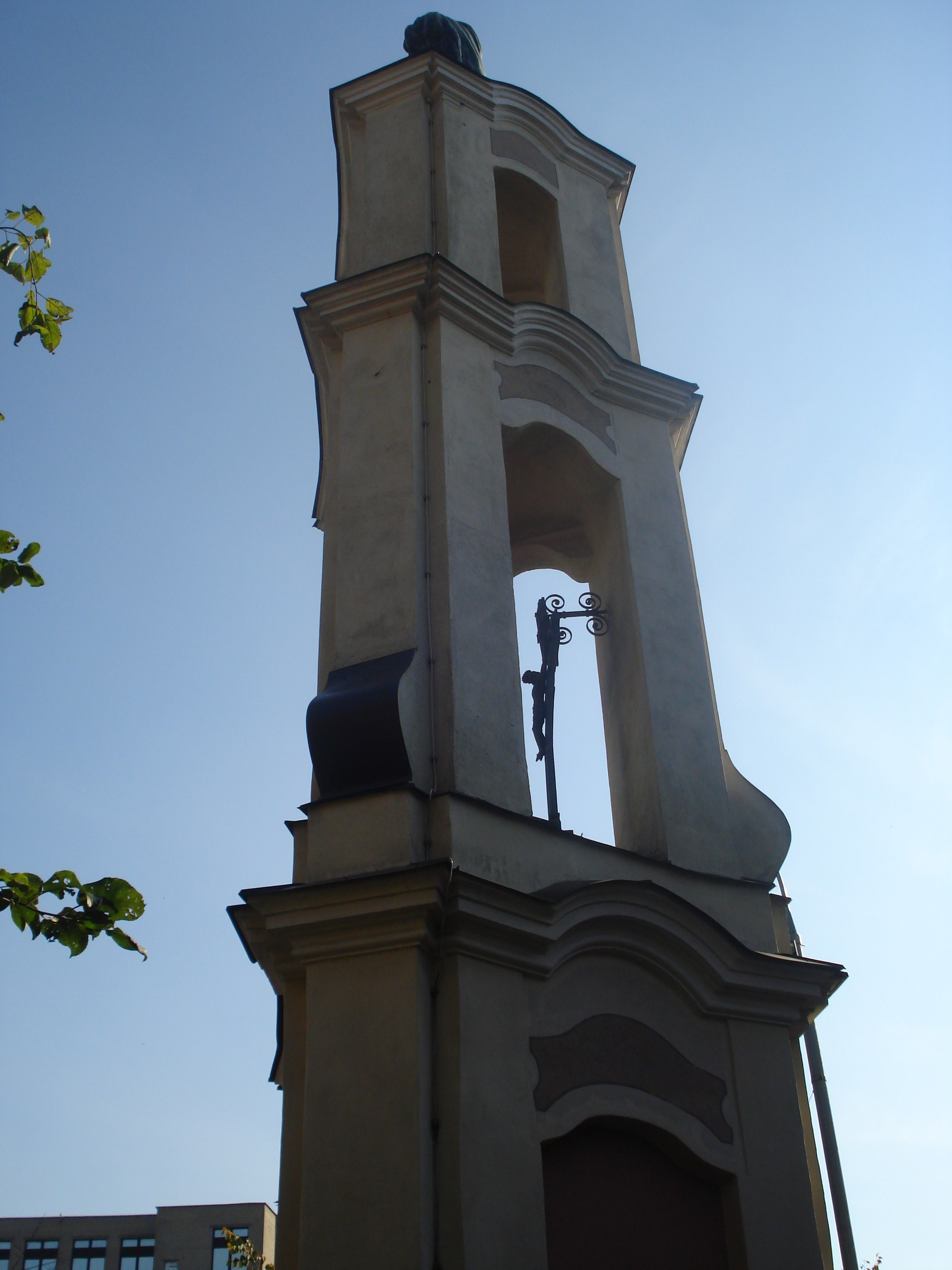 Chapel of St. Jacek (St. Hyacinthus) in Vilnius. Stone 1762; bronze sculpture by Bolesław Bałzukiewicz (1901)